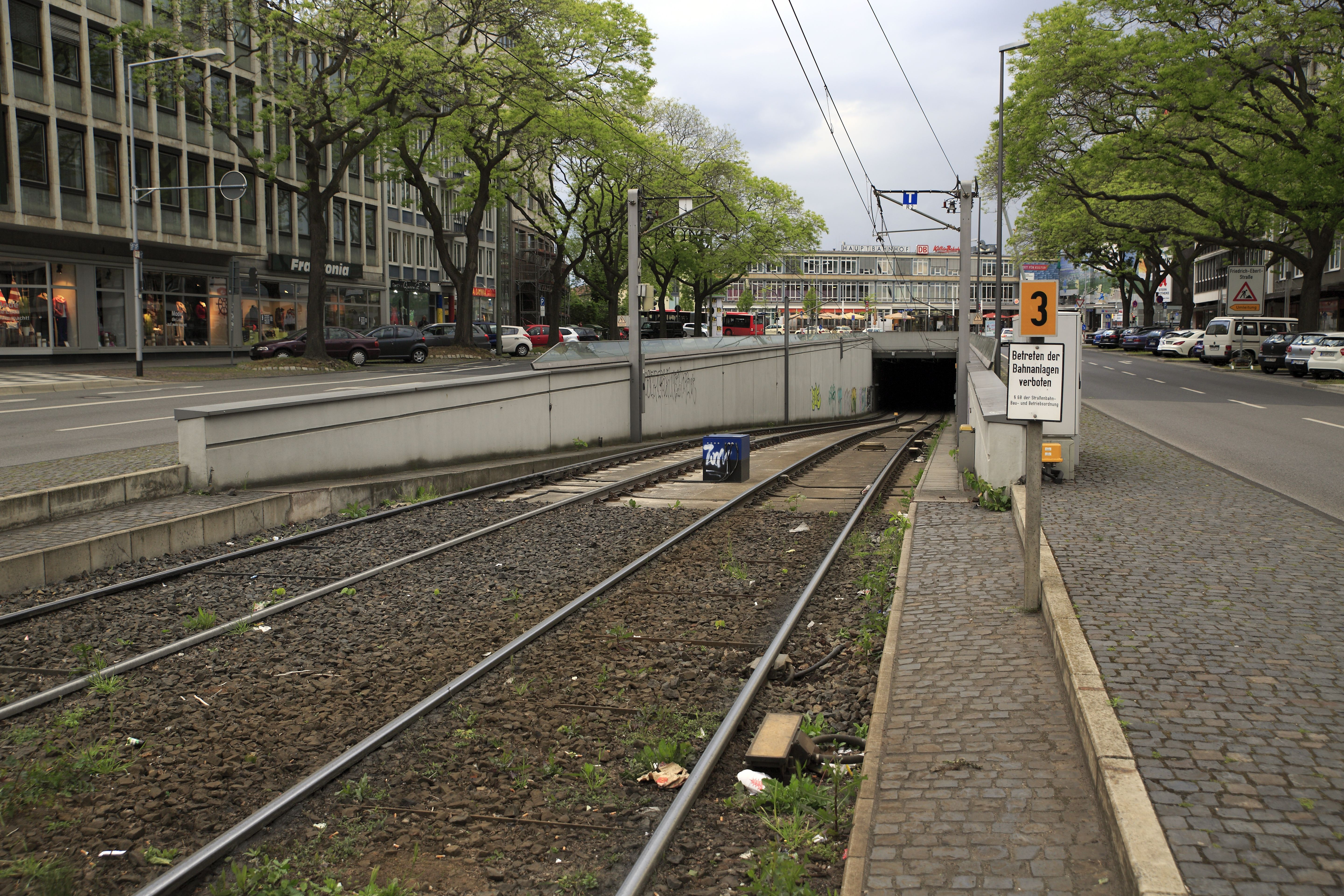 Die Tunnelrampe stammt von der ehemaligen unterirdischen Straßenbahnhaltestelle vor dem Hauptbahnhof, wurde an den Mischbetrieb angepasst und mit dem neugebauten Tunnel unter dem Kopfbau des Hauptbahnhofes verbunden. Die PZB-Gleismagnete gehören zur Geschwindigkeitsüberwachungseinrichtung für die Geschwindigkeitsbeschränkung auf 30km/h, die am Signal G 2a (nach SO Strab) beginnt.